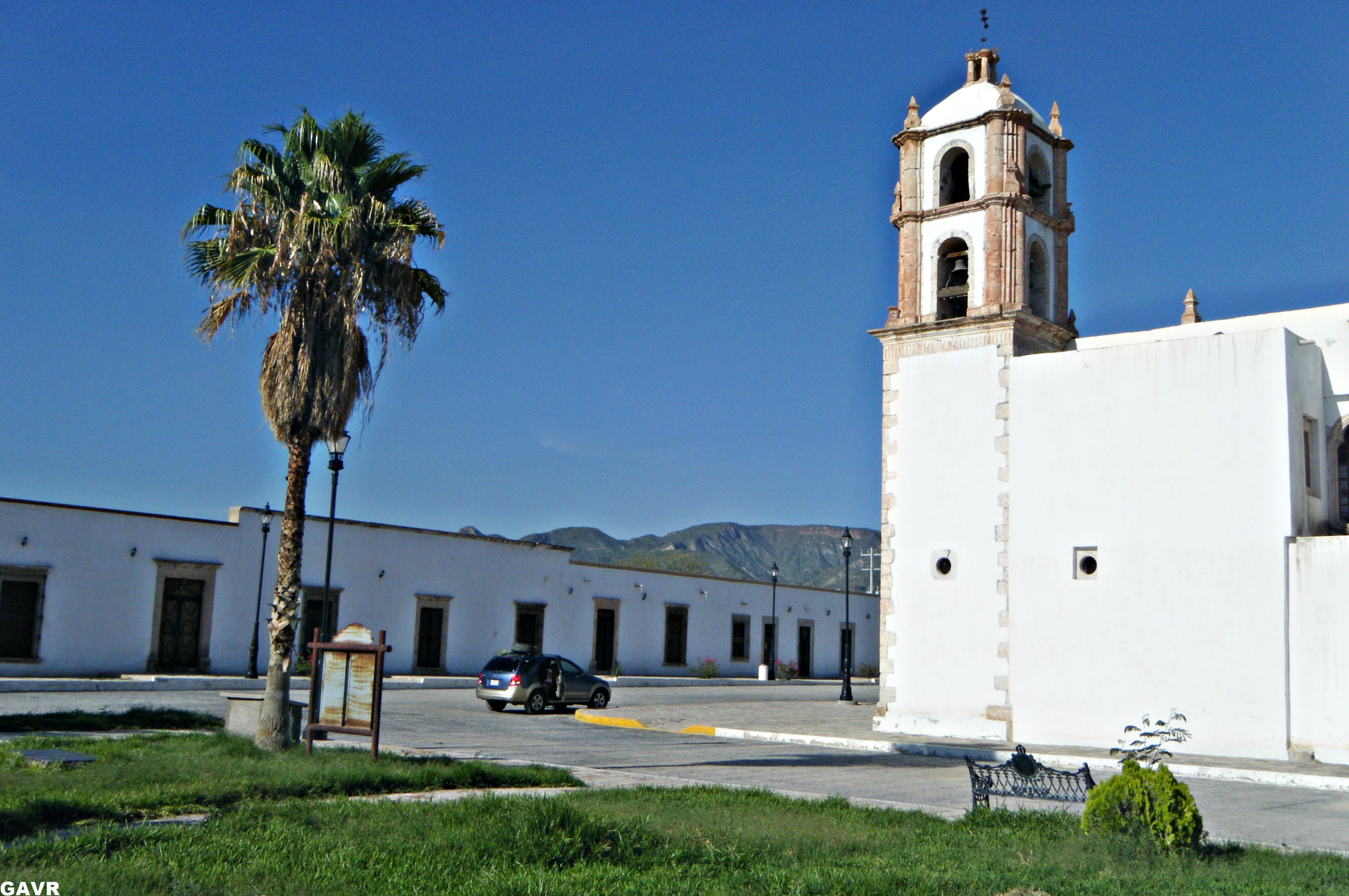 patrimonio de la humanidad tierra adentro